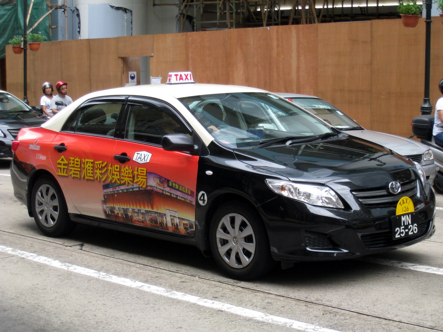 Macau Toyota Corolla 2008 Taxi 澳門的士